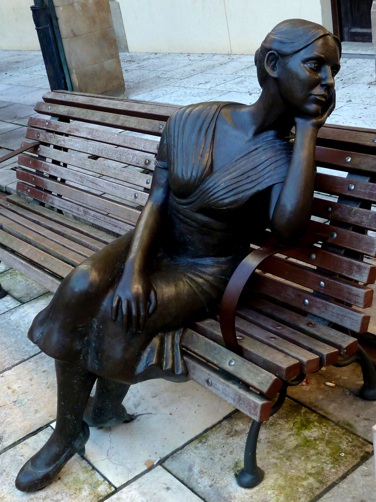 Esculturas de Oviedo